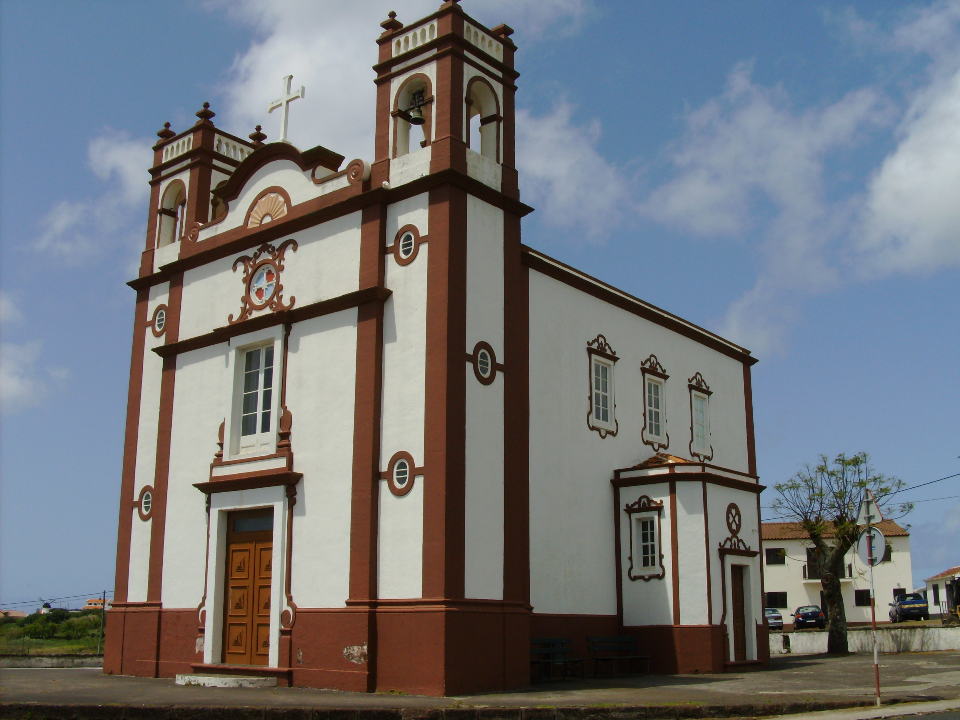 Igreja de Santo Antão, Vila do Porto,freguesia da Vila do Porto, concelho da Vila do Porto, ilha de Santa Maria, nos Açores: lateral esquerda.